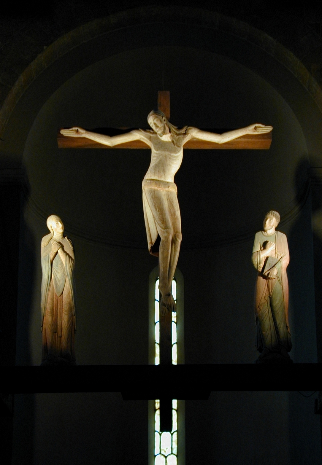 Basilika Seckau, Romanische Kreuzigungsgruppe hoch